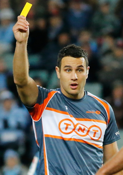 2017.07.08.20.32.25-WARvJAG-0001